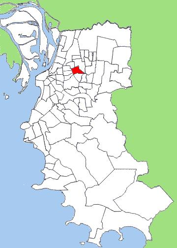 Mapa de alguns bairros de Porto Alegre, capital do Rio Grande do Sul, com destaque para o bairro Boa Vista.